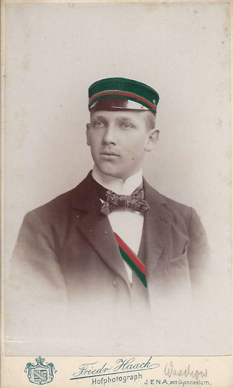 Porträtfotografie von Kurt Waschow